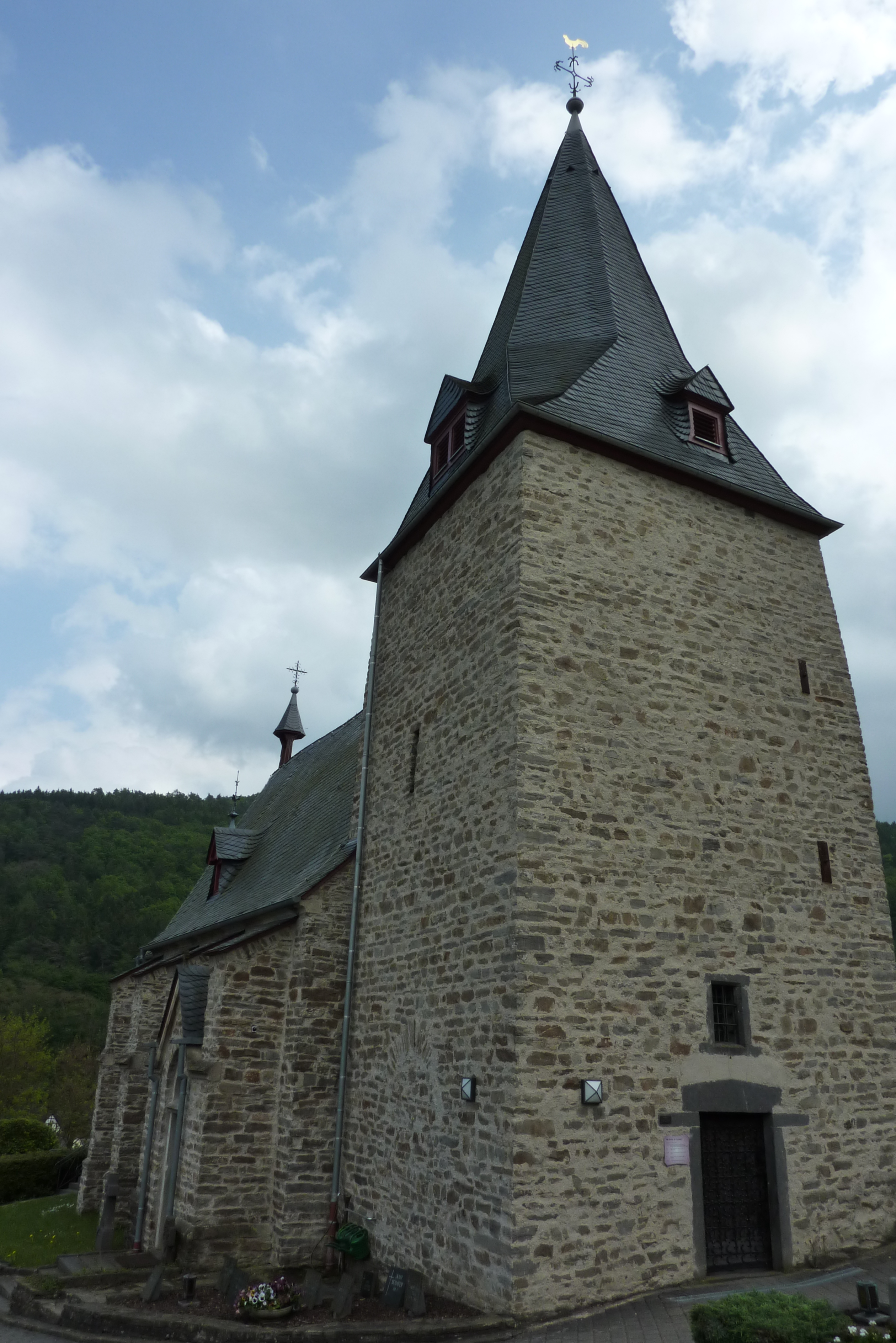 Katholische Kirche St. Cyriakus in Dümpelfeld, Ansicht von Westen